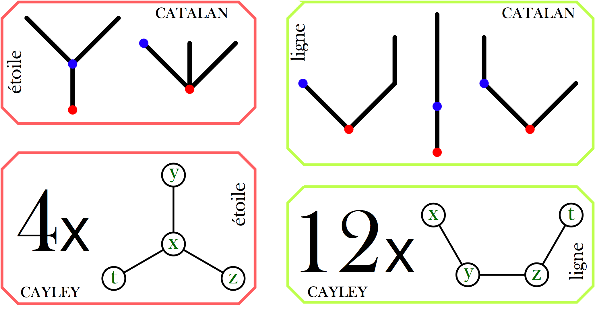 La différence entre les arbres de Cayley et les arbres de Catalan : énumération des arbres à 3 arêtes de chacune des deux catégories